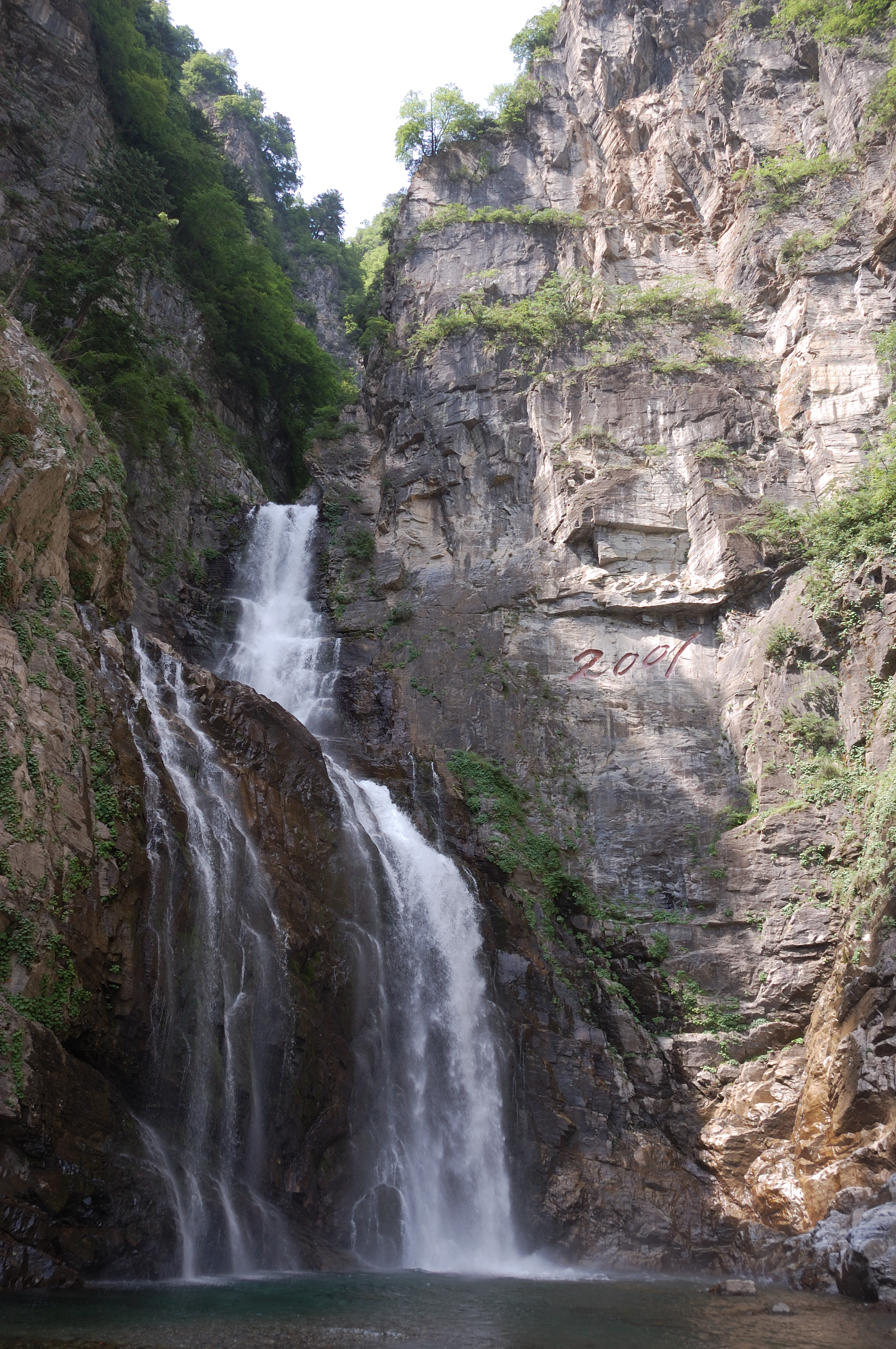 Ullim Waterfall, Munchon.